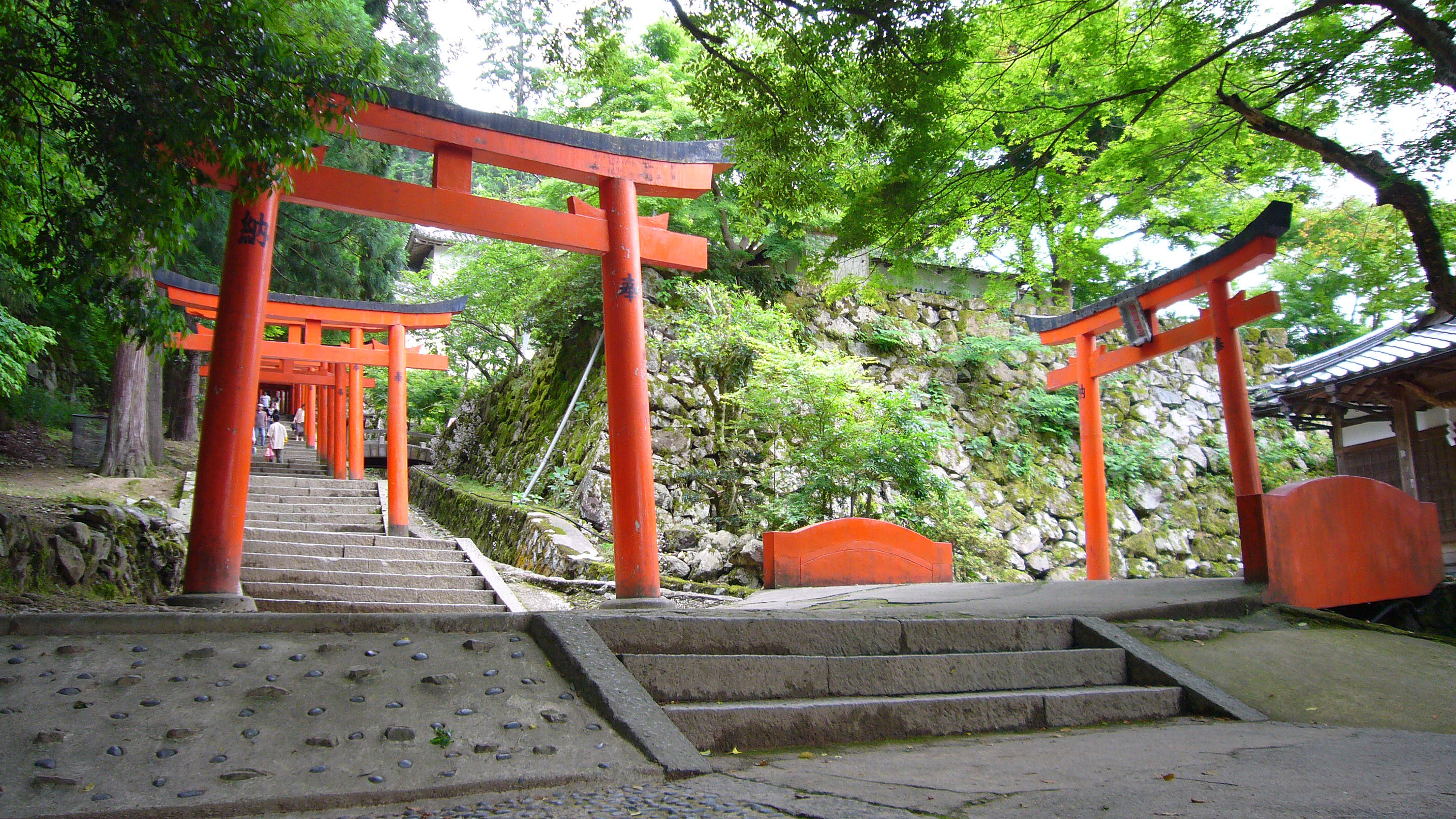 Izushi Castle in Toyooka, Hyogo, Japan